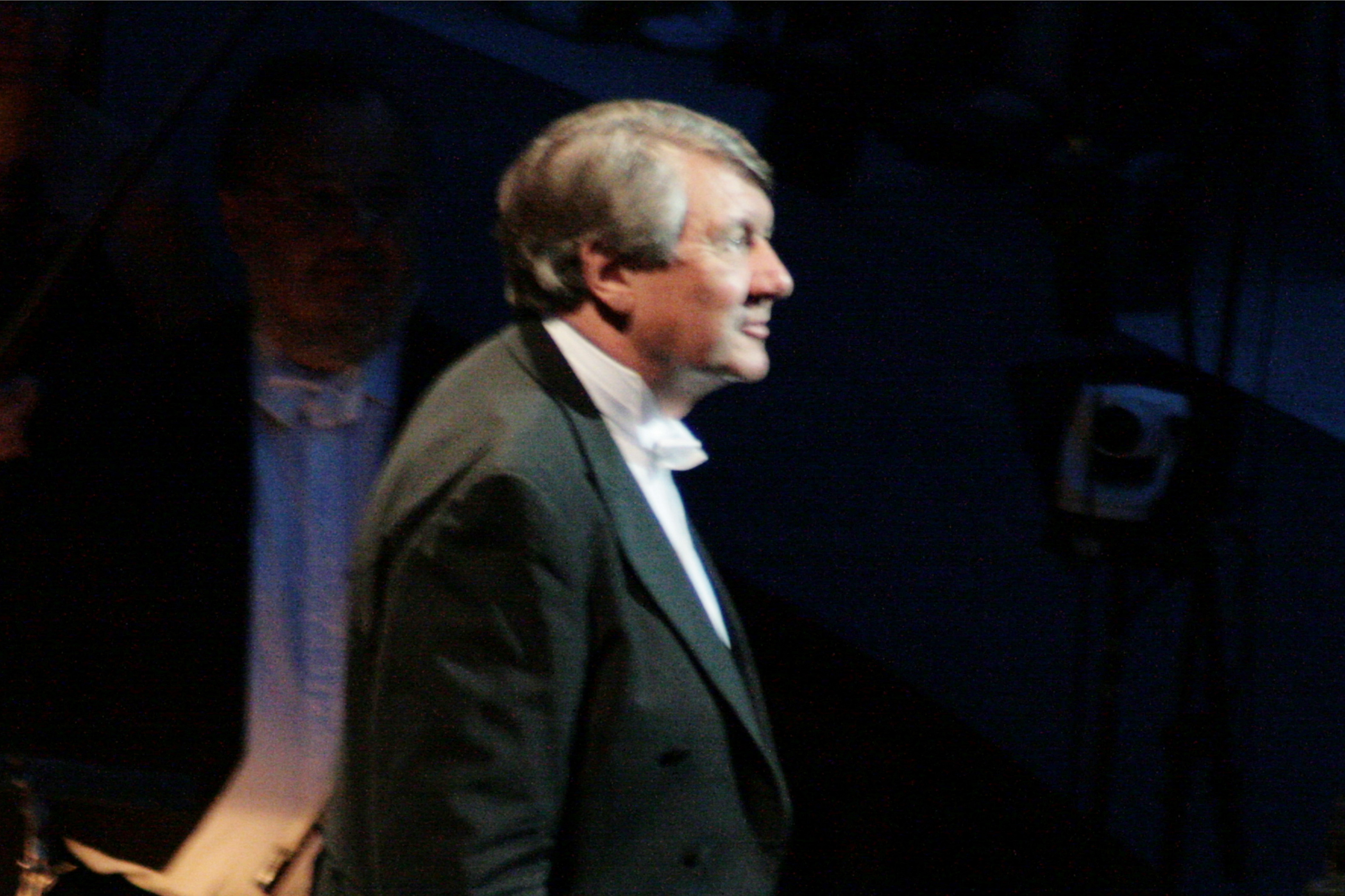 Michel Plasson dirigeant Faust aux Chorégies d'Orange 2008